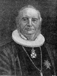 Johannes Nilsson Skaar, norwegian bishop